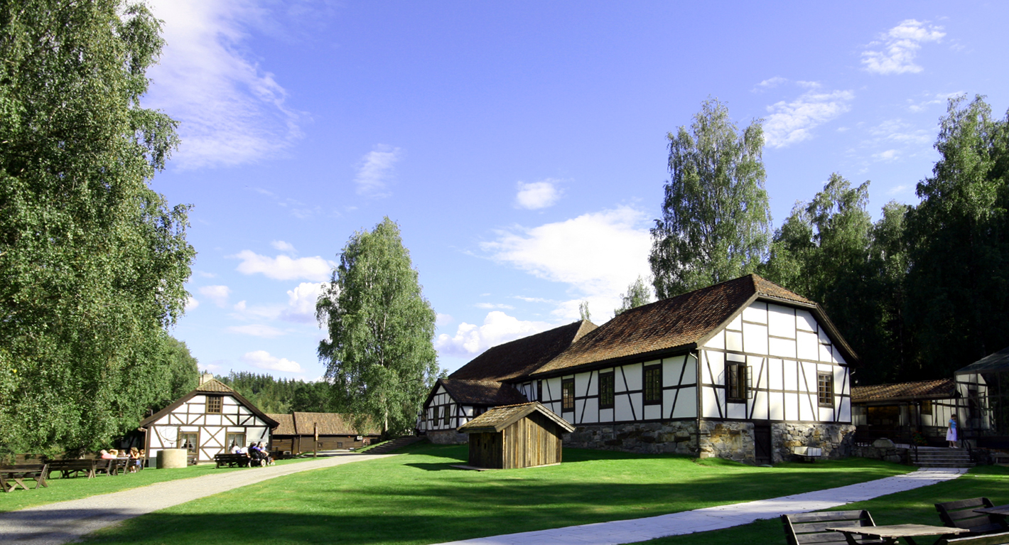 Blåfargeverket, Modum. Til venstre: Bøkkerverkstedet. Til høgre: Mølla. Freda.